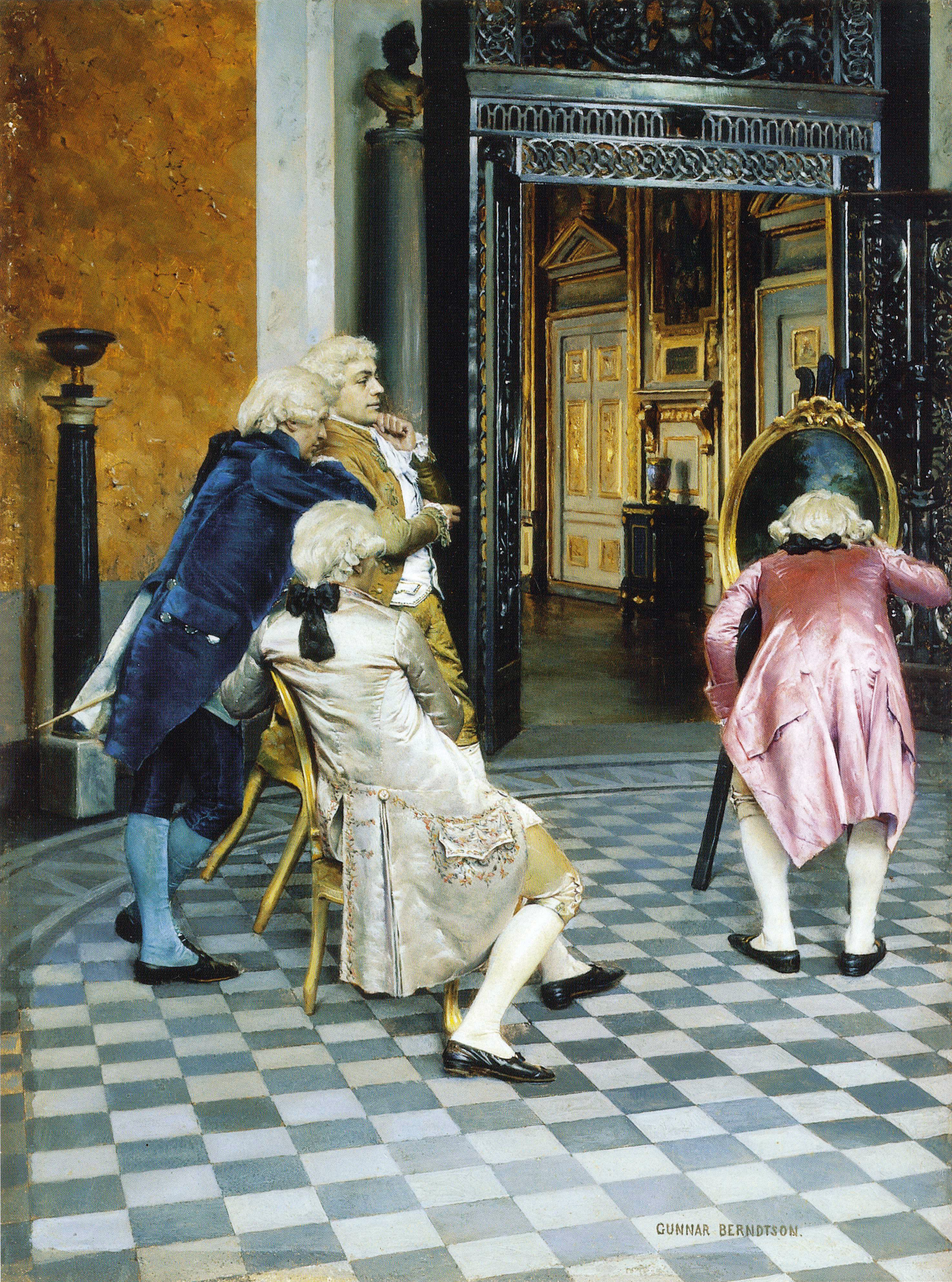 Gunnar Berndtsonin öljymaalaus Taiteentuntijoita Louvressa, kuuluu Serlachiuksen taidemuseon kokoelmiin.